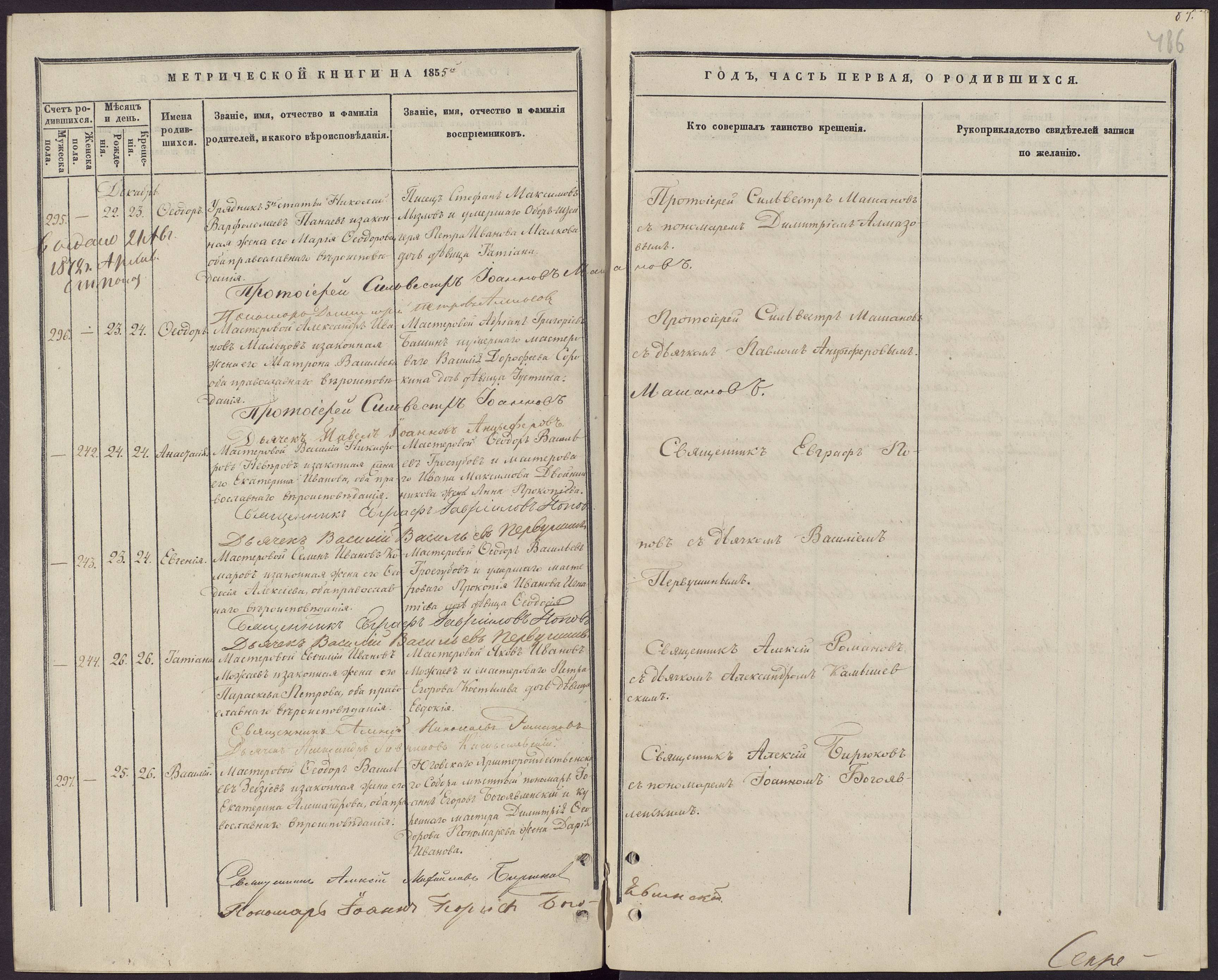 Метрическая книга Юговского Казённого Завода за 1855 год. Крещеие за 22-26 декабря.